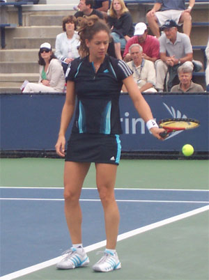 Patty Schnyder